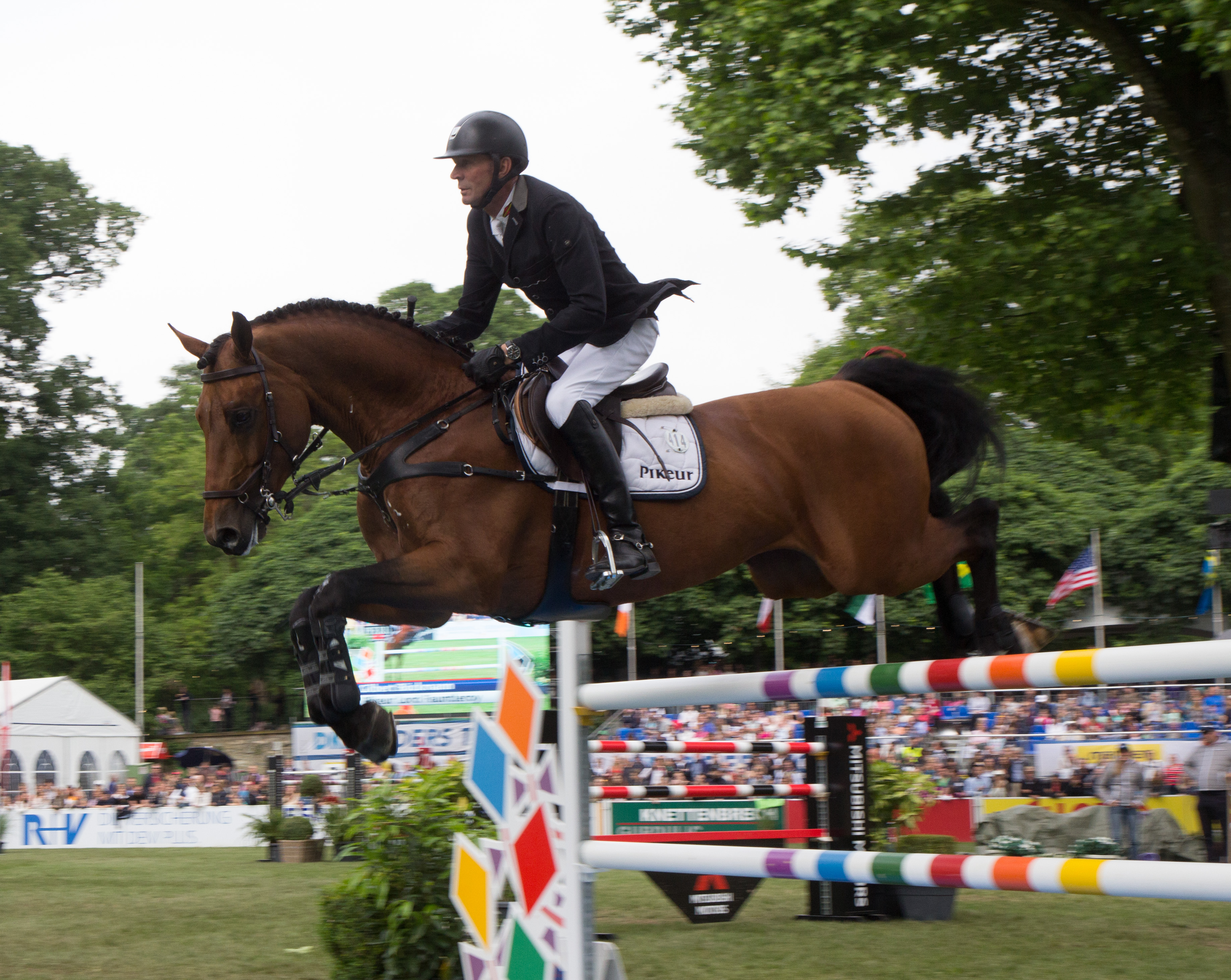 Internationales Wiesbadener Pfingstturnier 2018. CSI 4* Springprüfung KI.S *** m. Stechen (1,50m) "Preis des Hessischen Ministerpräsidenten": Gilbert Böckmann auf Pikeur Loird Faundleroy